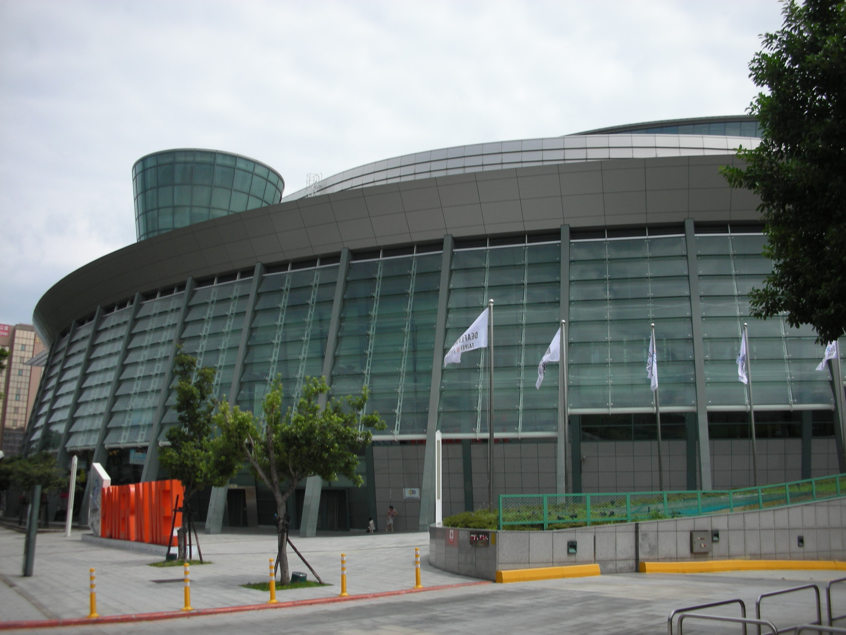 2009年夏季聽障奧林匹克運動會時期的臺北小巨蛋。